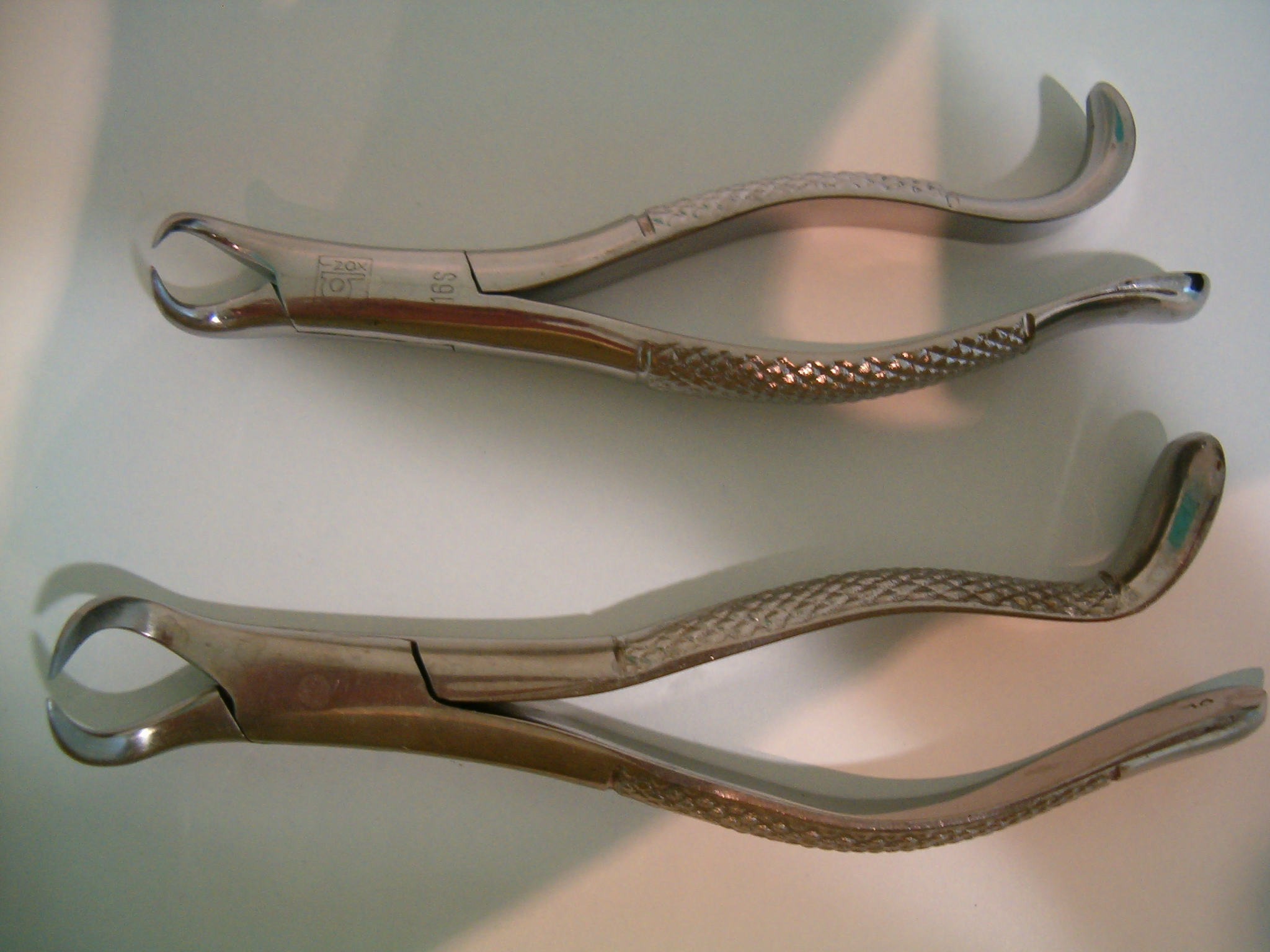 Fórceps odontológicos(boticões)